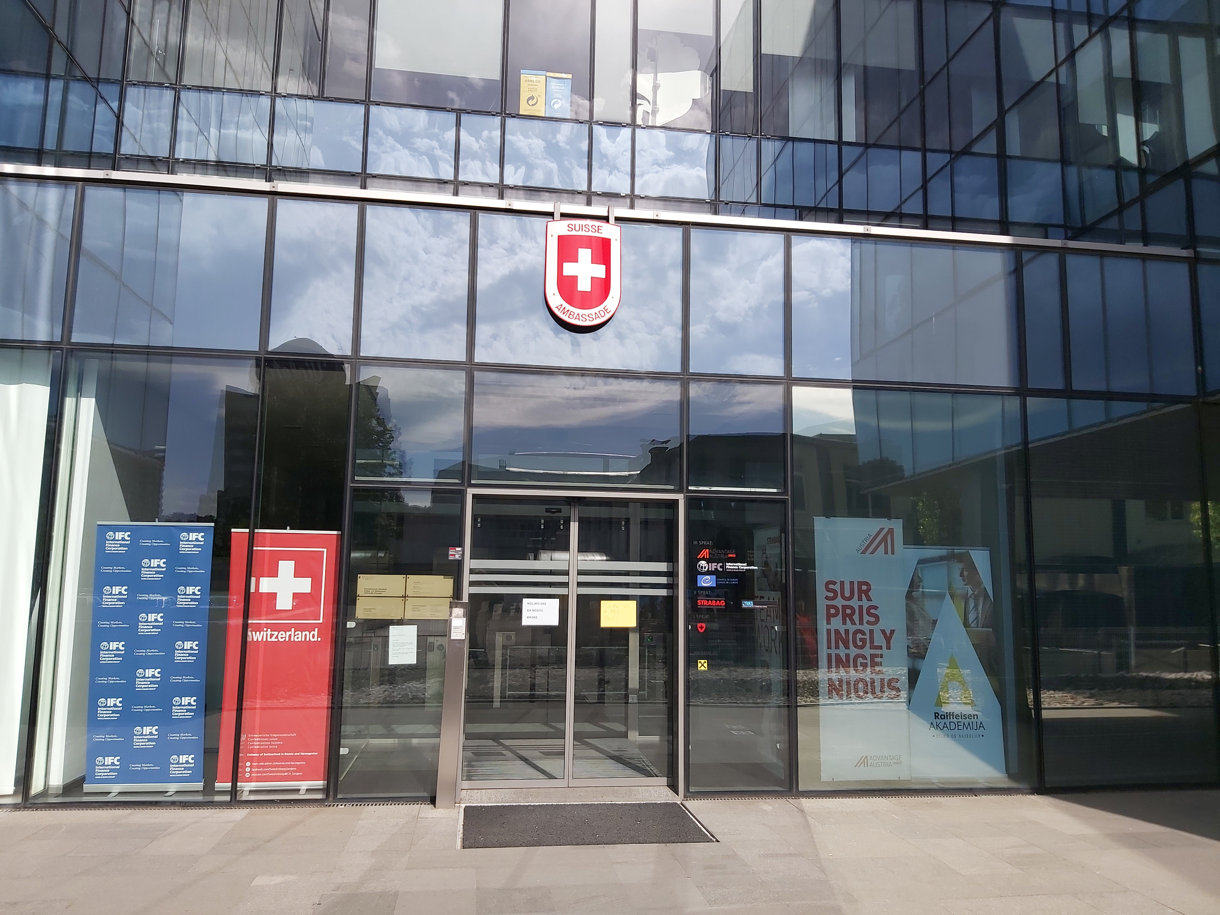 Ambasada Švicarske u Bosni i Hercegovini